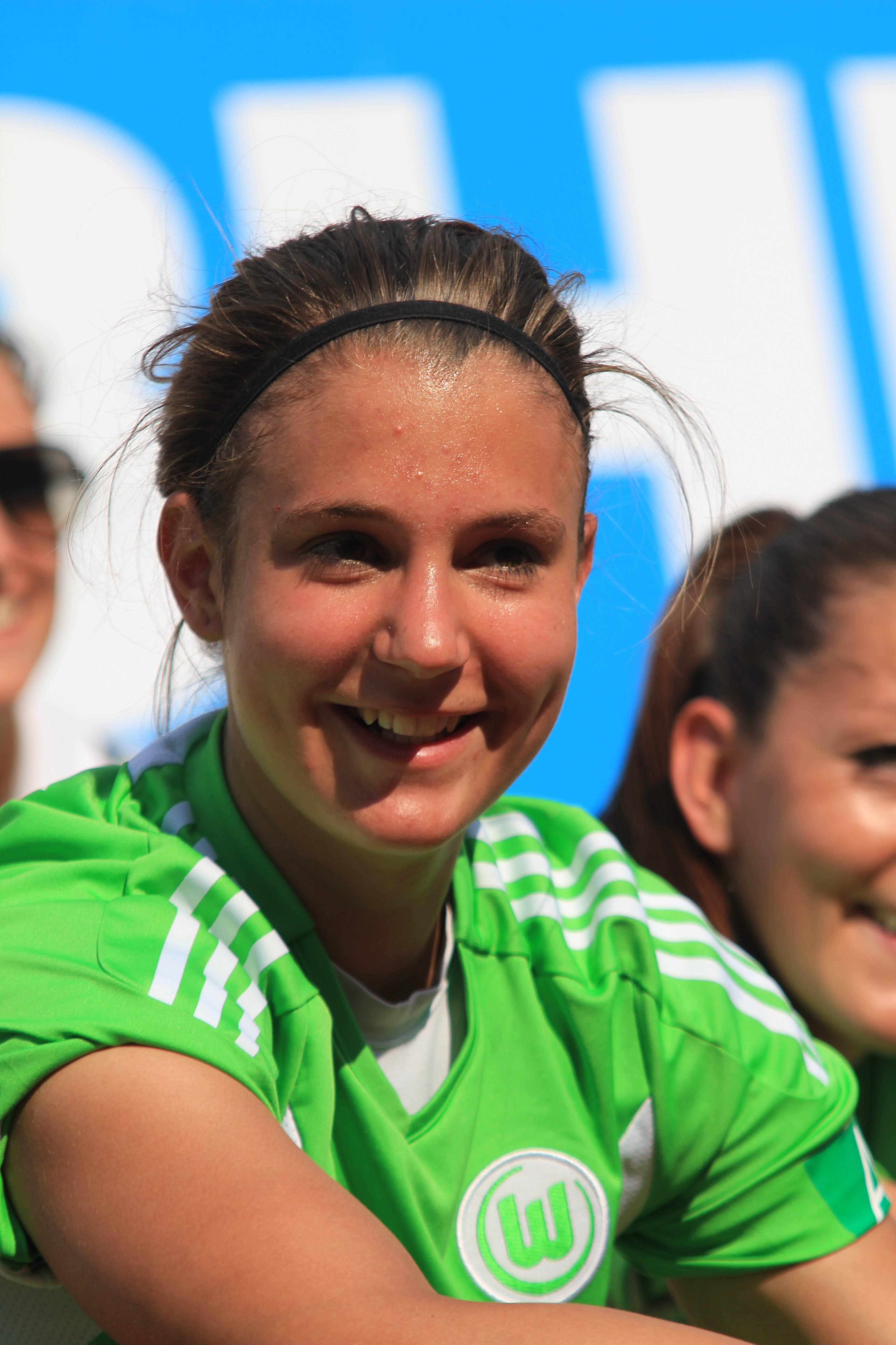 Nathalie Bock, VfL Wolfsburg